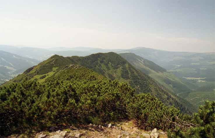 Kozí hřbety z vyhlídky na Krakonoši autor:Zp